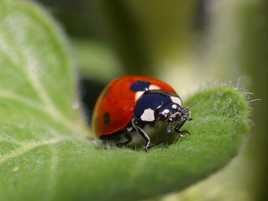 mariquita